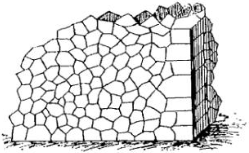 Opus incertum, mur romain antique formé de maçonnerie à parements formés de moellons polygonaux, raccordés à lits et joints perdus